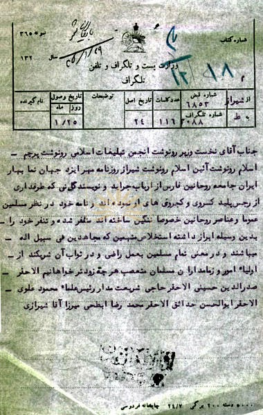 تلگراف جامعه روحانيان فارس و درخواست آزادی متهمان قتل كسروی